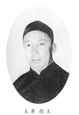 徳穆楚克栋鲁普 (德王) (1902 - 1966)